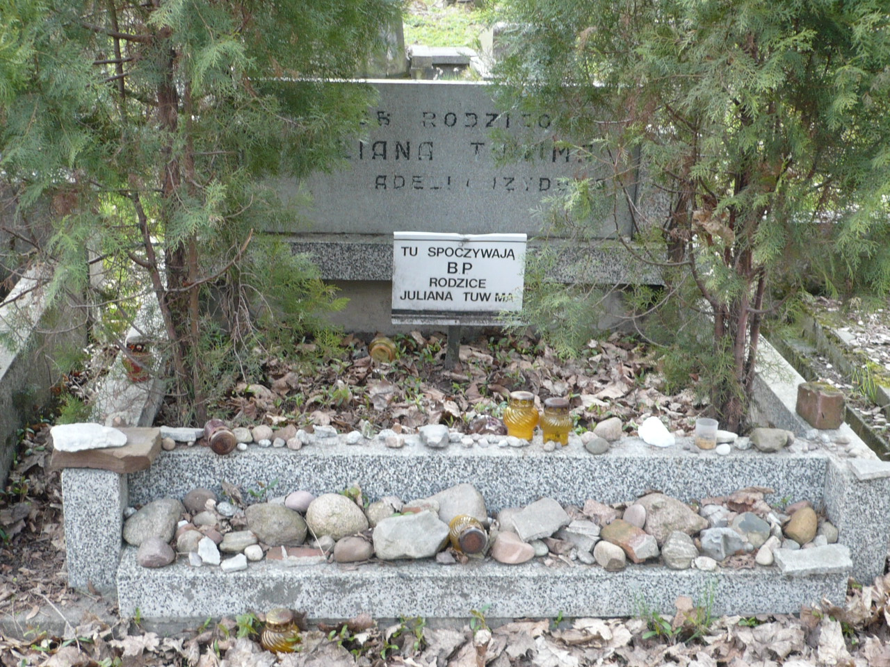 Grób rodziców Juliana Tuwima - Adeli i Izydora. Nowy cmentarz żydowski przy ul. Brackiej, kwatera "Lewa F".